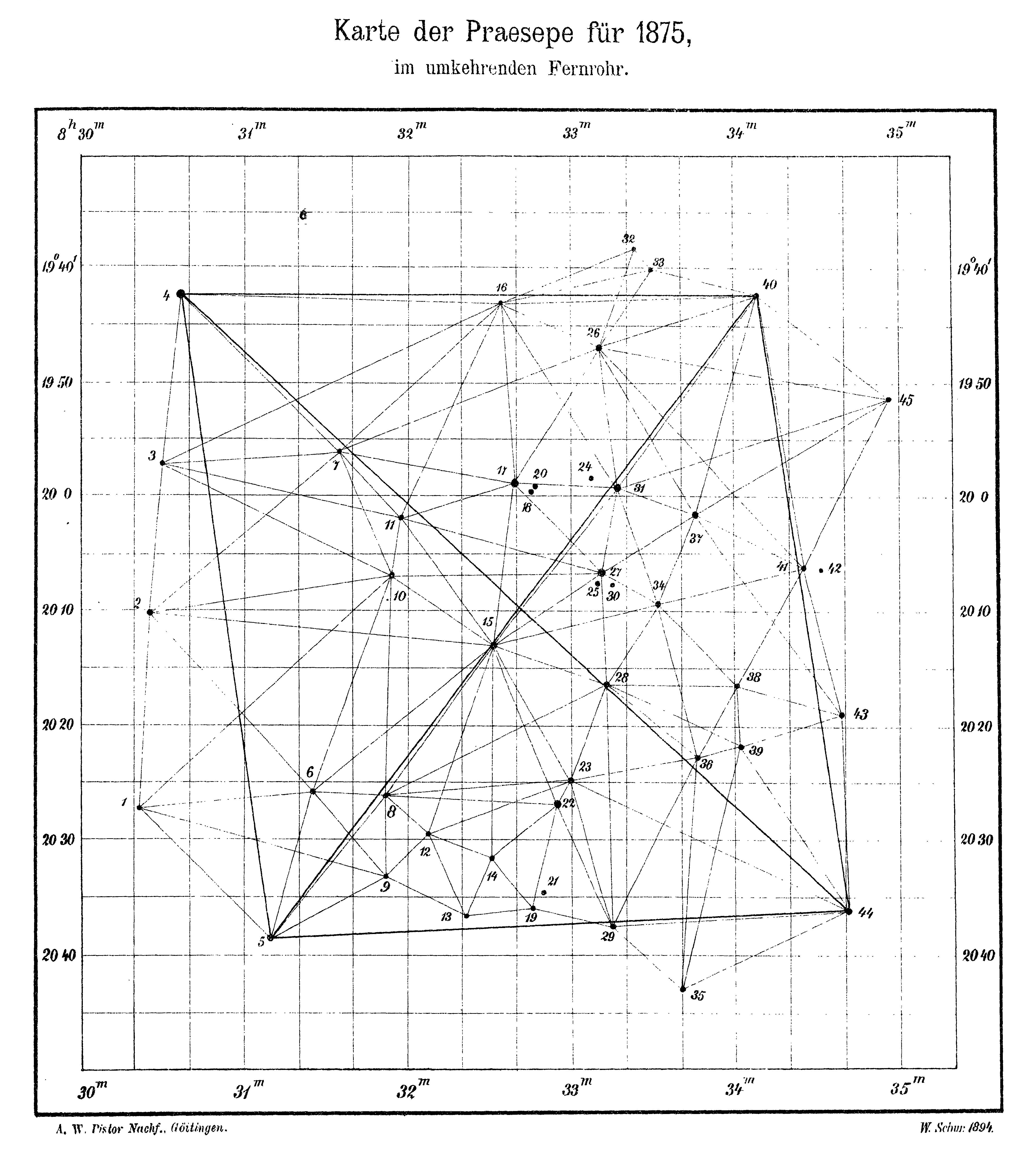 Karte der Praesepe für 1875 im umkehrenden Fernrohr, Zeichnung von Wilhelm Schur, 1894.